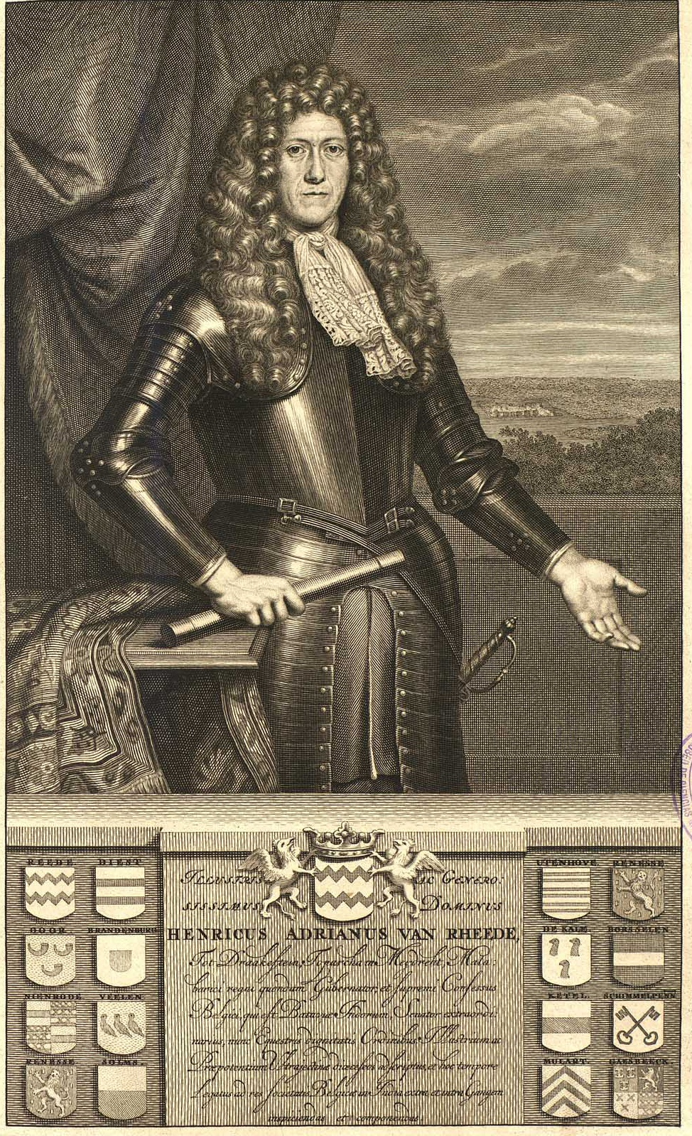 Henrik Adriaan Van Rheede